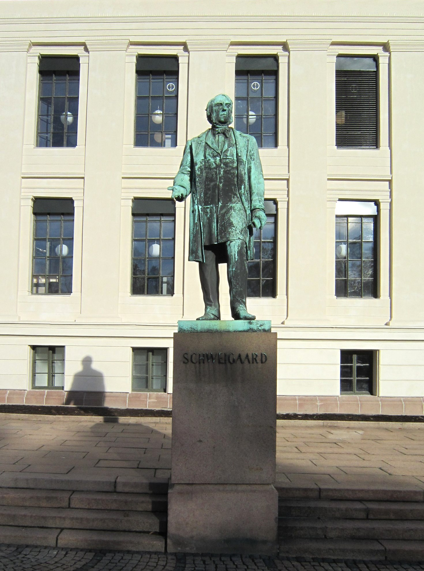 Statue av A.M. Schweigaard foran universitetet på Karl Johan (kunstner: Julius Middelthun)